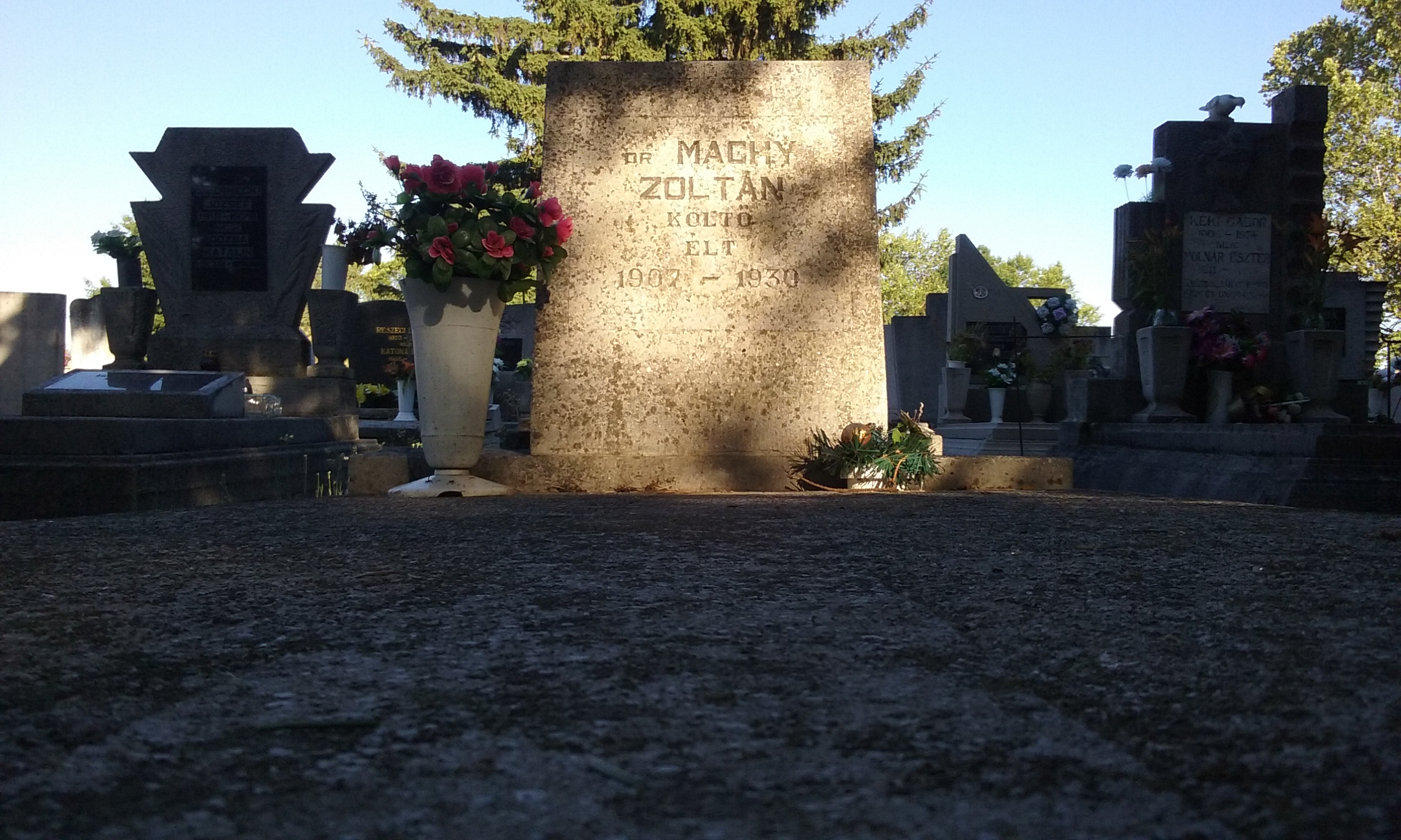 Maghy Zoltán sírja a hajdúnánási temetőben. A kép 2017. június 13-án készült.